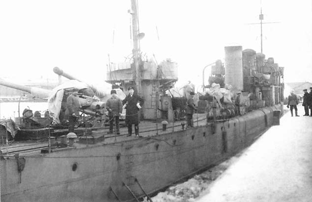 Захваченный англичанами и переданный эстонцам эсминец «Автроил» («Lennuk»). На палубе в форме стоит Г. Е. Вейгелин. Ревель, 2 января 1919 года.